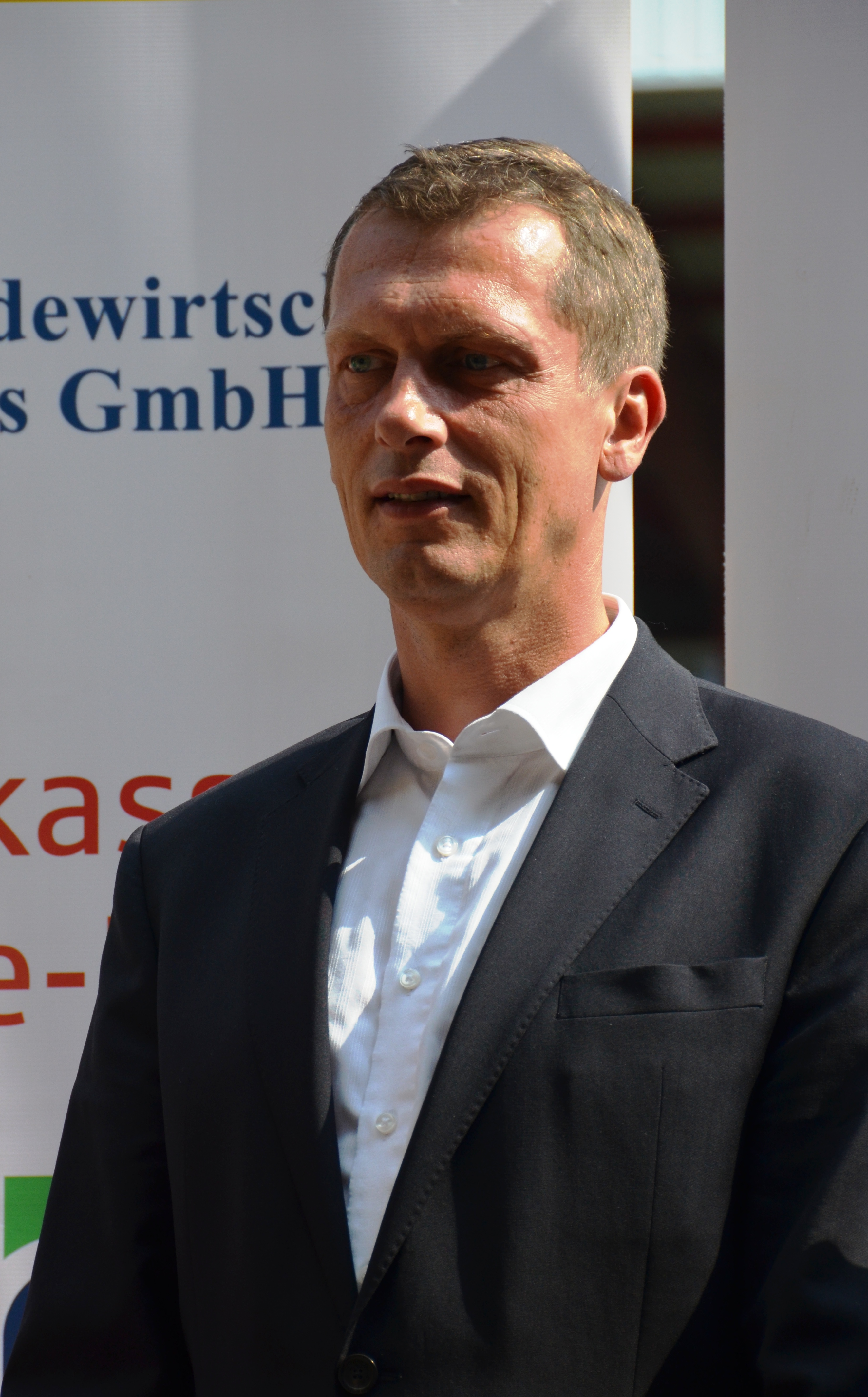 Holger Kelch, Bürgermeister von Cottbus The making of this document was supported by the Community-Budget of Wikimedia Germany.